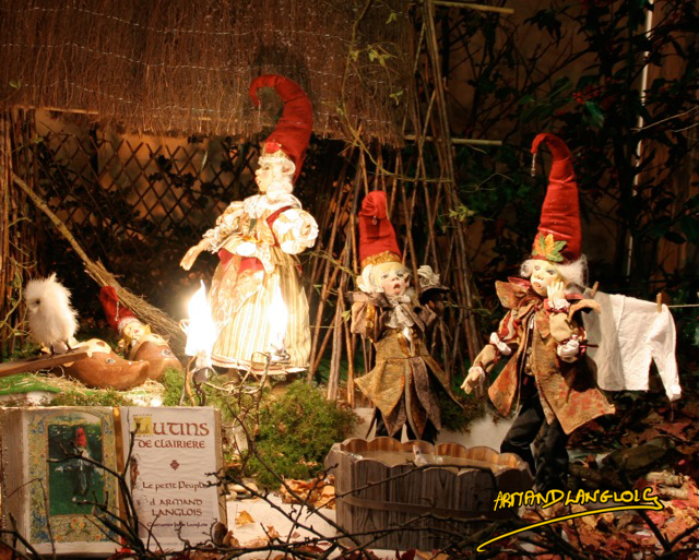 Le Petit peuple vu par le plasticien Armand Langlois, scène animée.